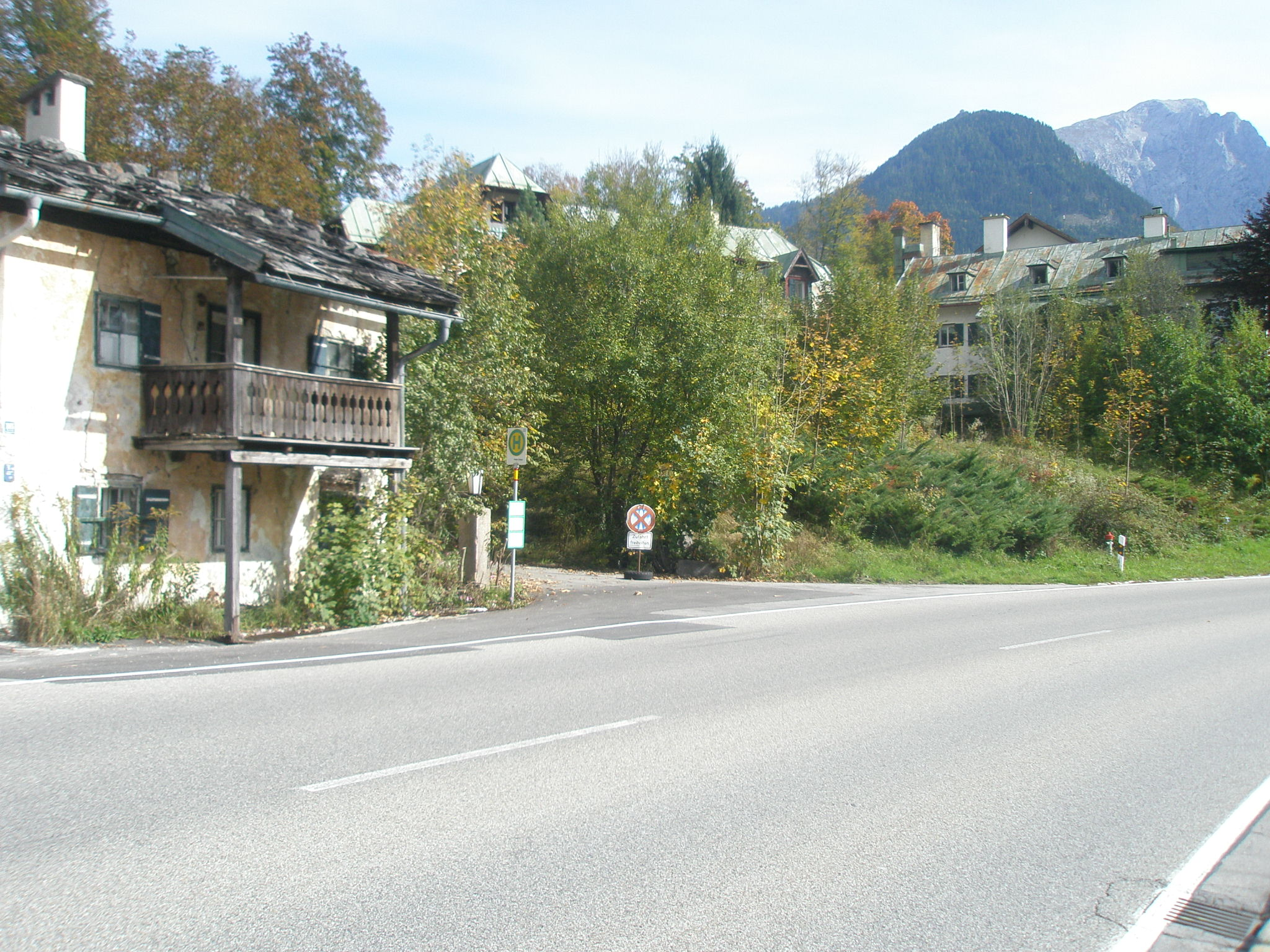 Hotel Geiger (Bischofswiesen) im Oktober 2012, Aussenansicht, links der Auffahrt zum Hotal das 2016 abgerissene Schneiderhäusl